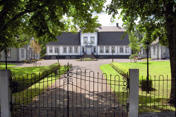 Ludvika herrgård